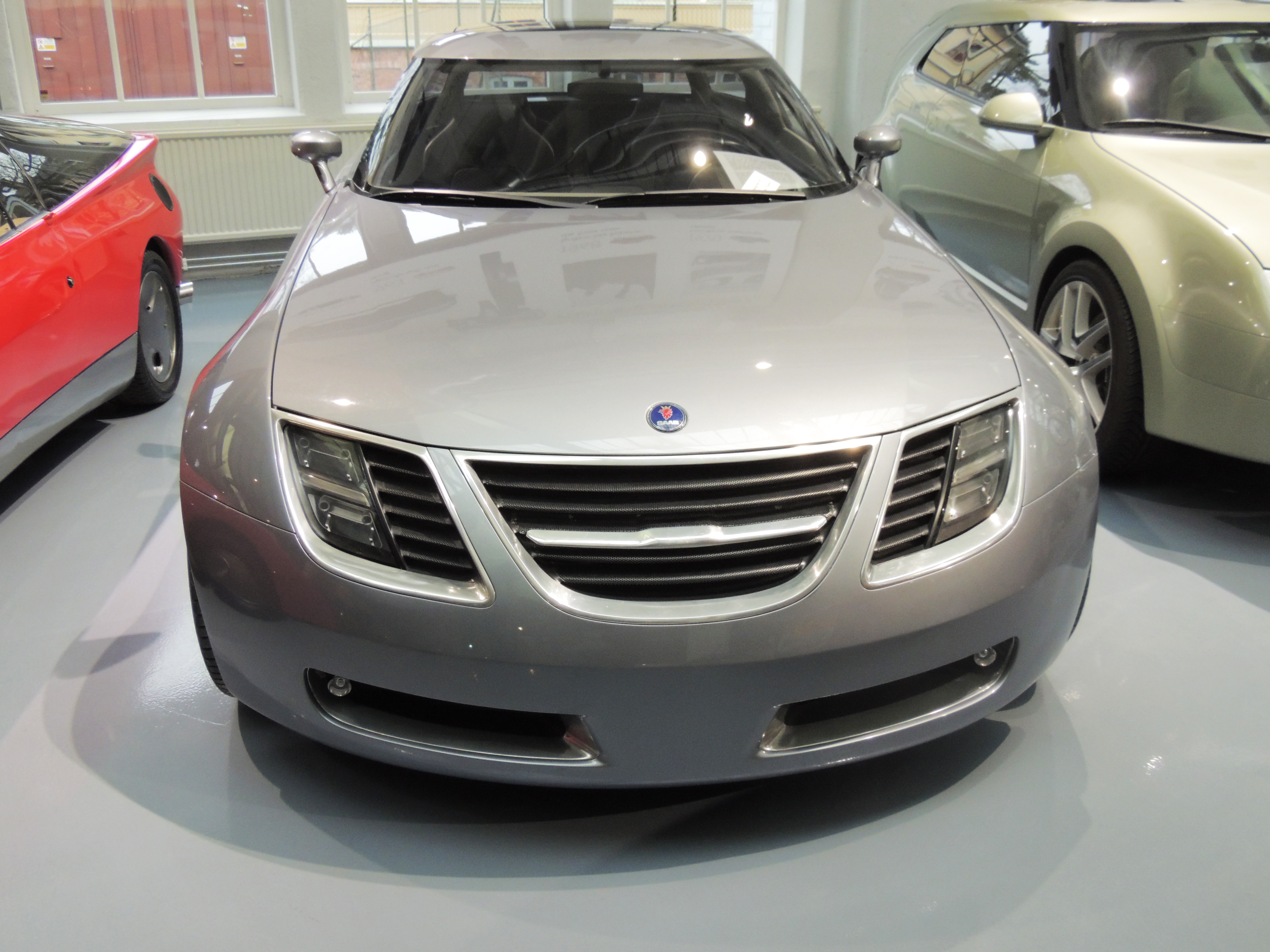 Saab 9X1